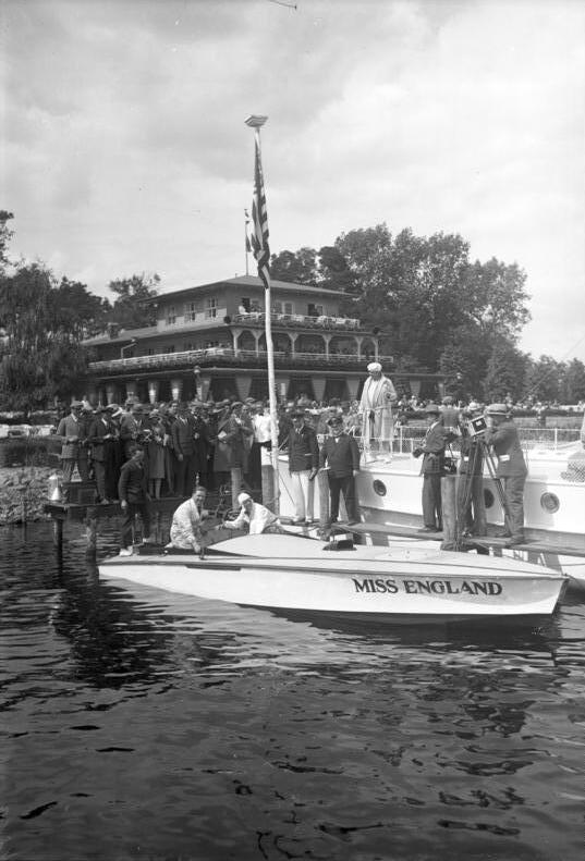 Die grossen Internationalen Motorbootrennen auf dem Templiner See in Potsdam bei Berlin! Major Sir Henry Segrave, der berühmte Recordrennfahrer mit seinem Motorboot "Miss England" vor den Tribünen in Potsdam.